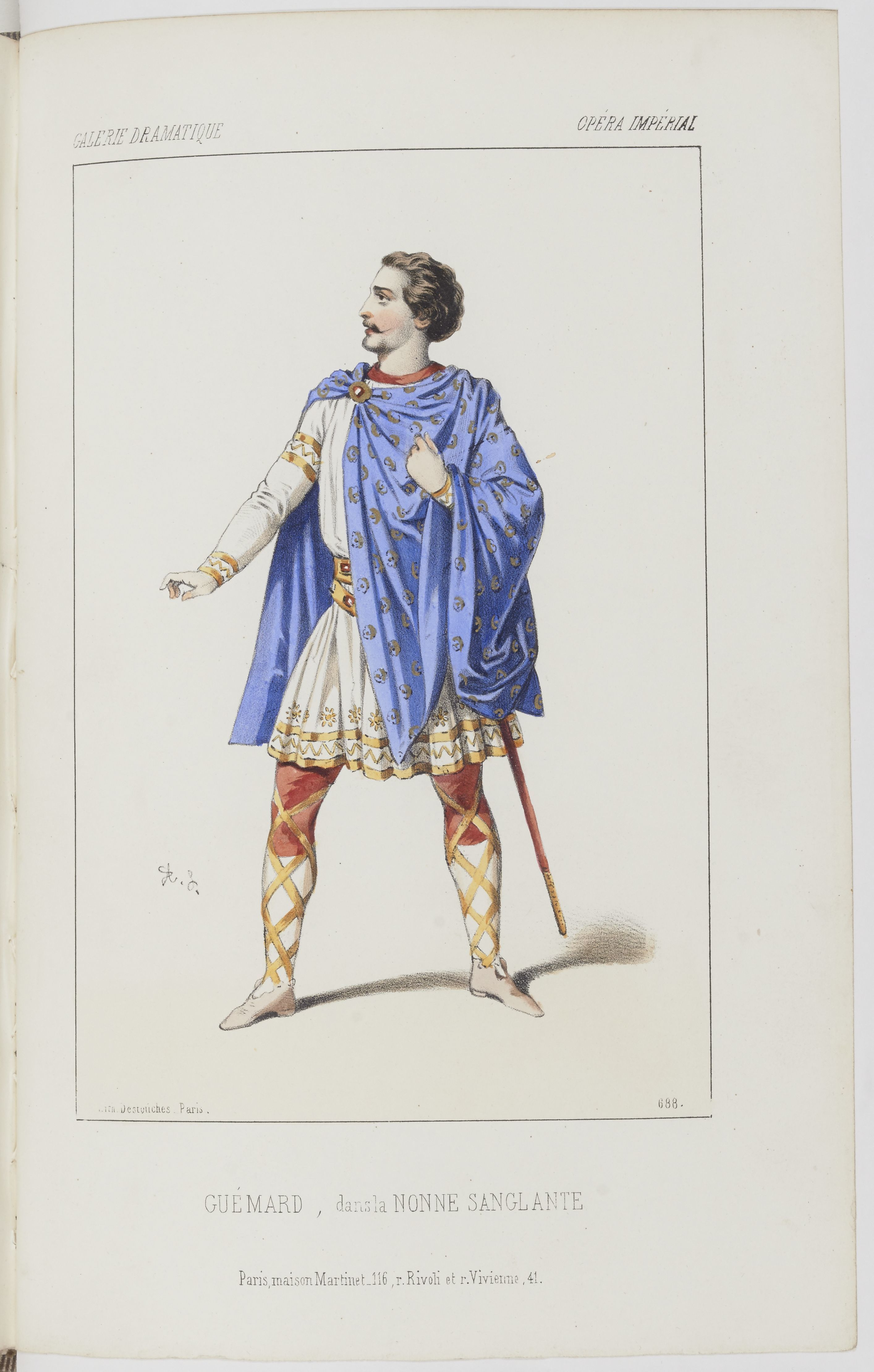 Guémart dans La nonne sanglante par Alexandre Lacauchie